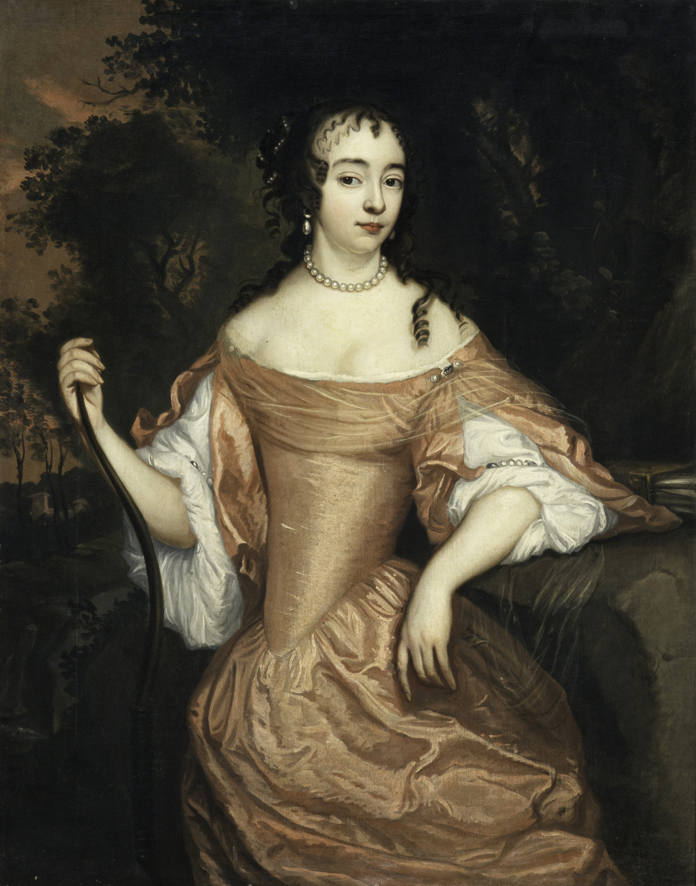 Sie war eine niederländische Prinzessin aus dem Haus Oranien und durch Heirat Pfalzgräfin von Simmern. Sie starb in Kreuznach an der Nahe.